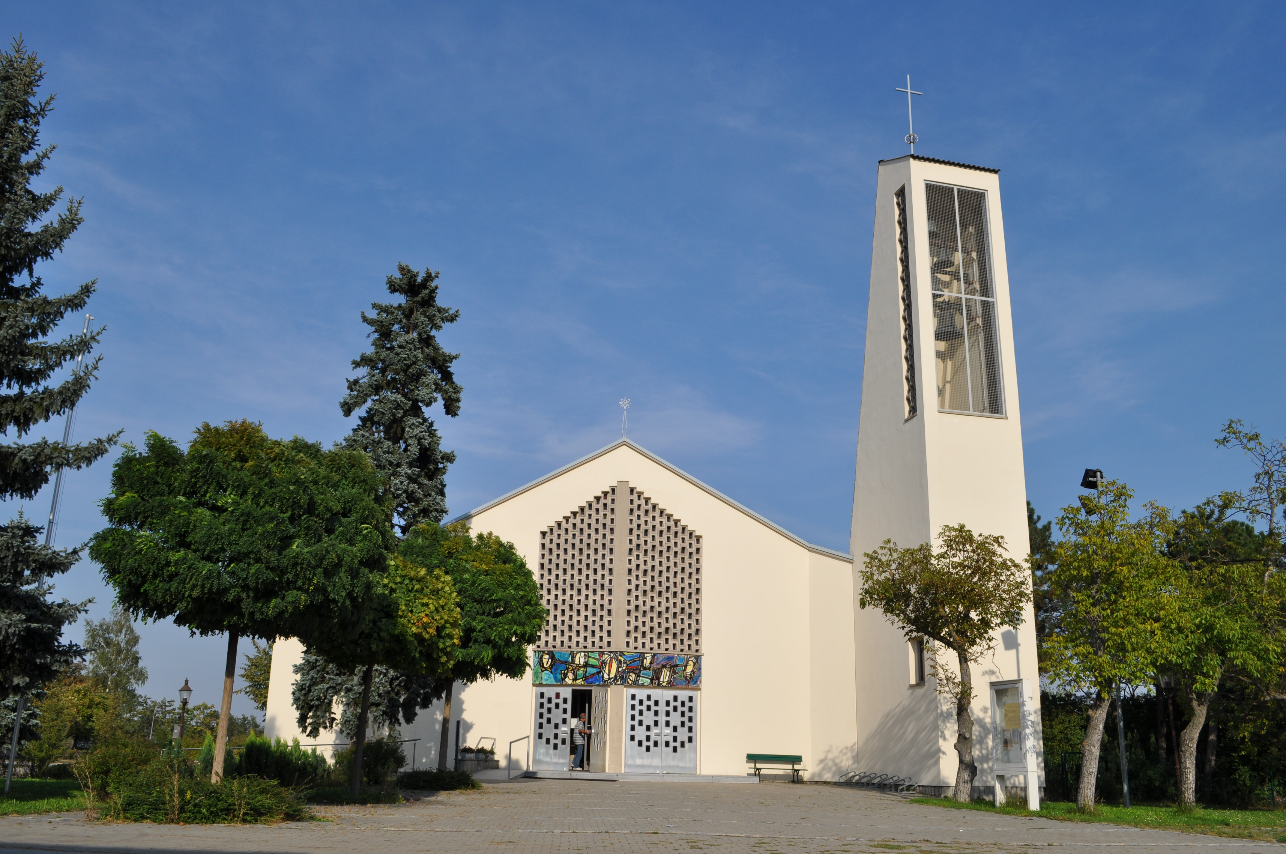 Kath. Pfarrkirche Unbefleckte Empfängnis in Felixdorf, Niederösterreich.